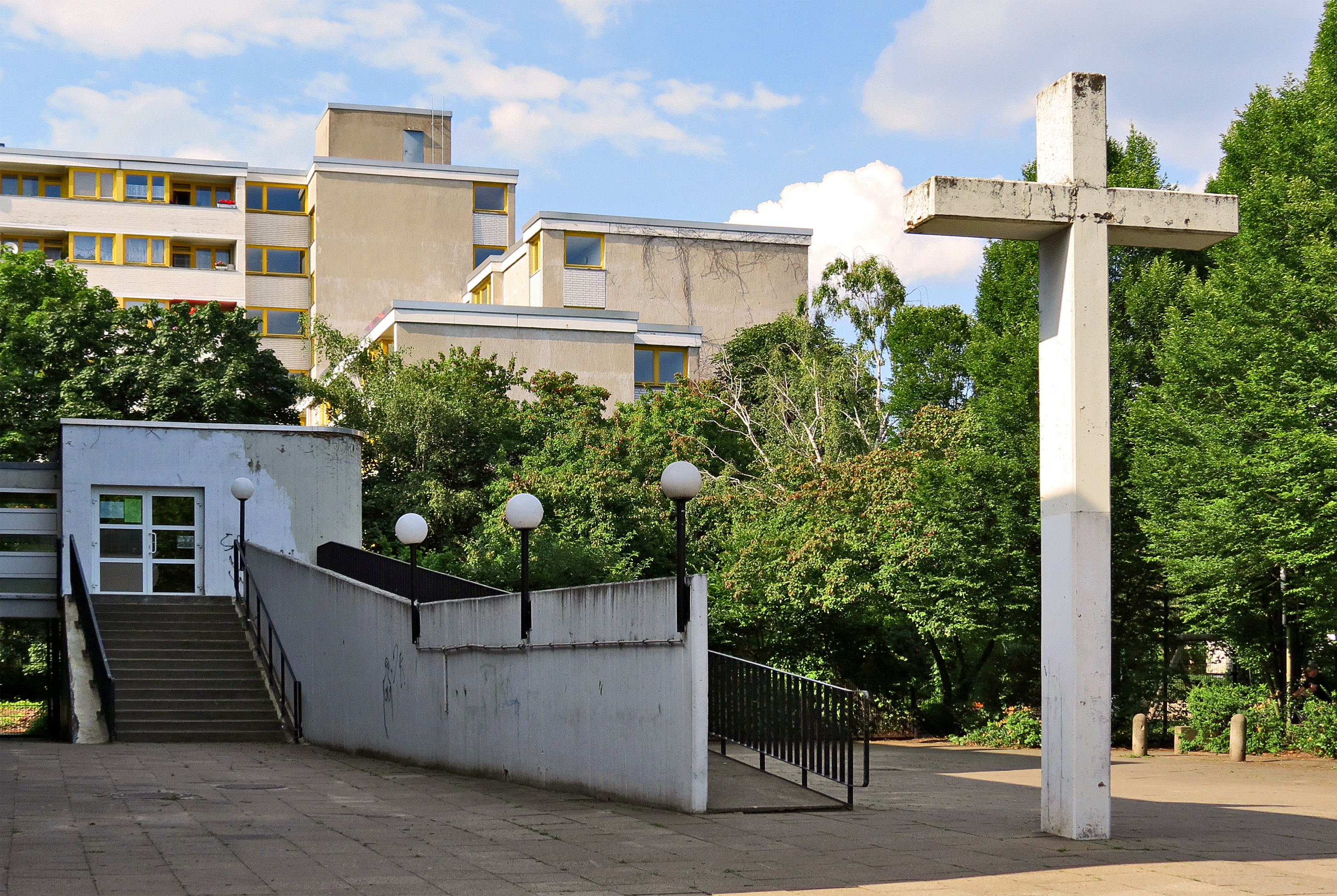 Gemeindezentrum Plötzensee